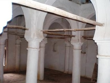 Kalâ Beni Abbès Eléments d’architecture